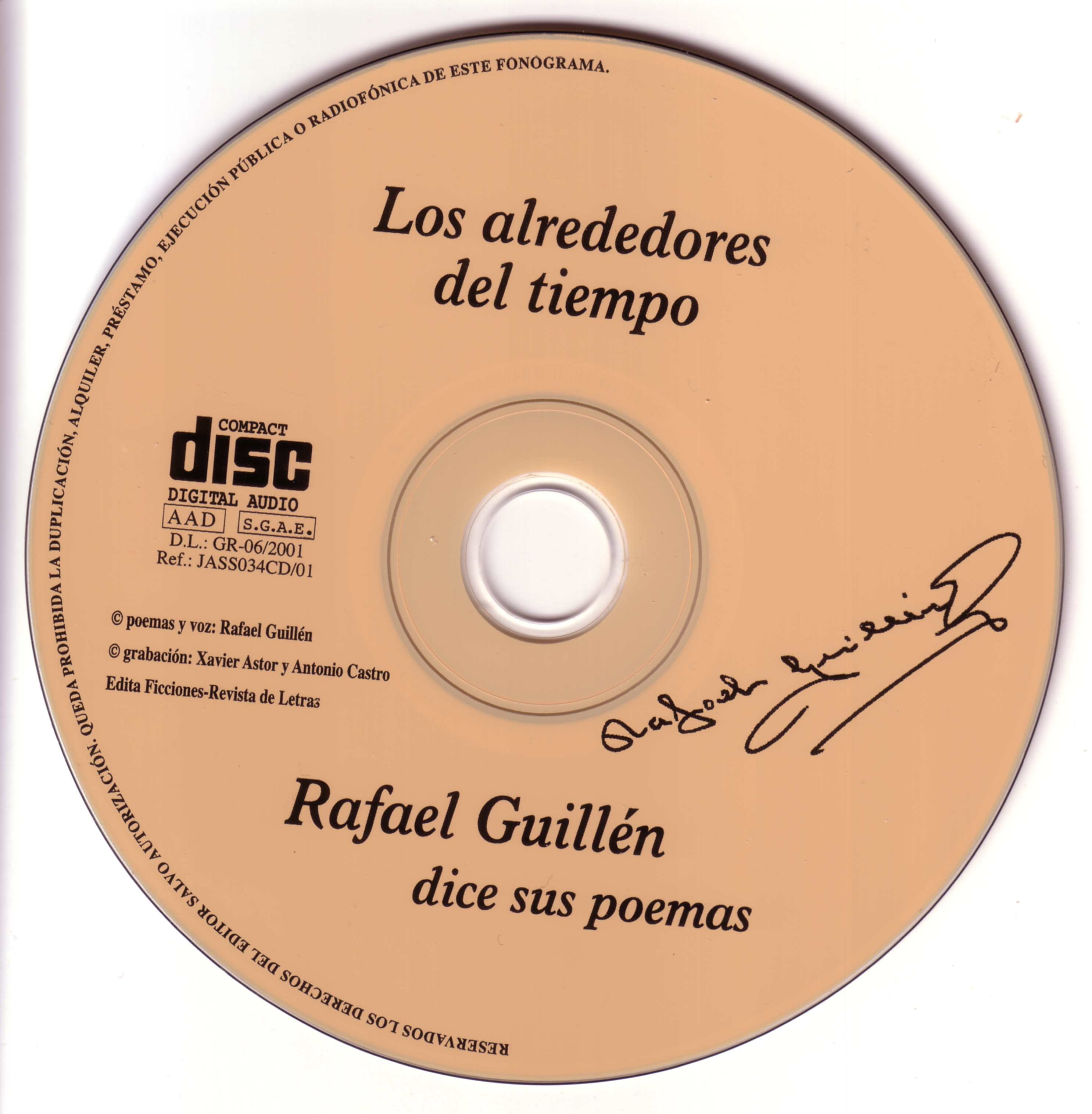 Galleta del CD "Los alrededores del tiempo". Registro sonoro del poeta Rafael Guillén leyendo una antología de sus poemas. Producción de Xavier Astor. Producción ejecutiva de Xavier Astor y Antonio Castro. Edición de Producciones Peligrosas / Ficciones Revista de Letras.